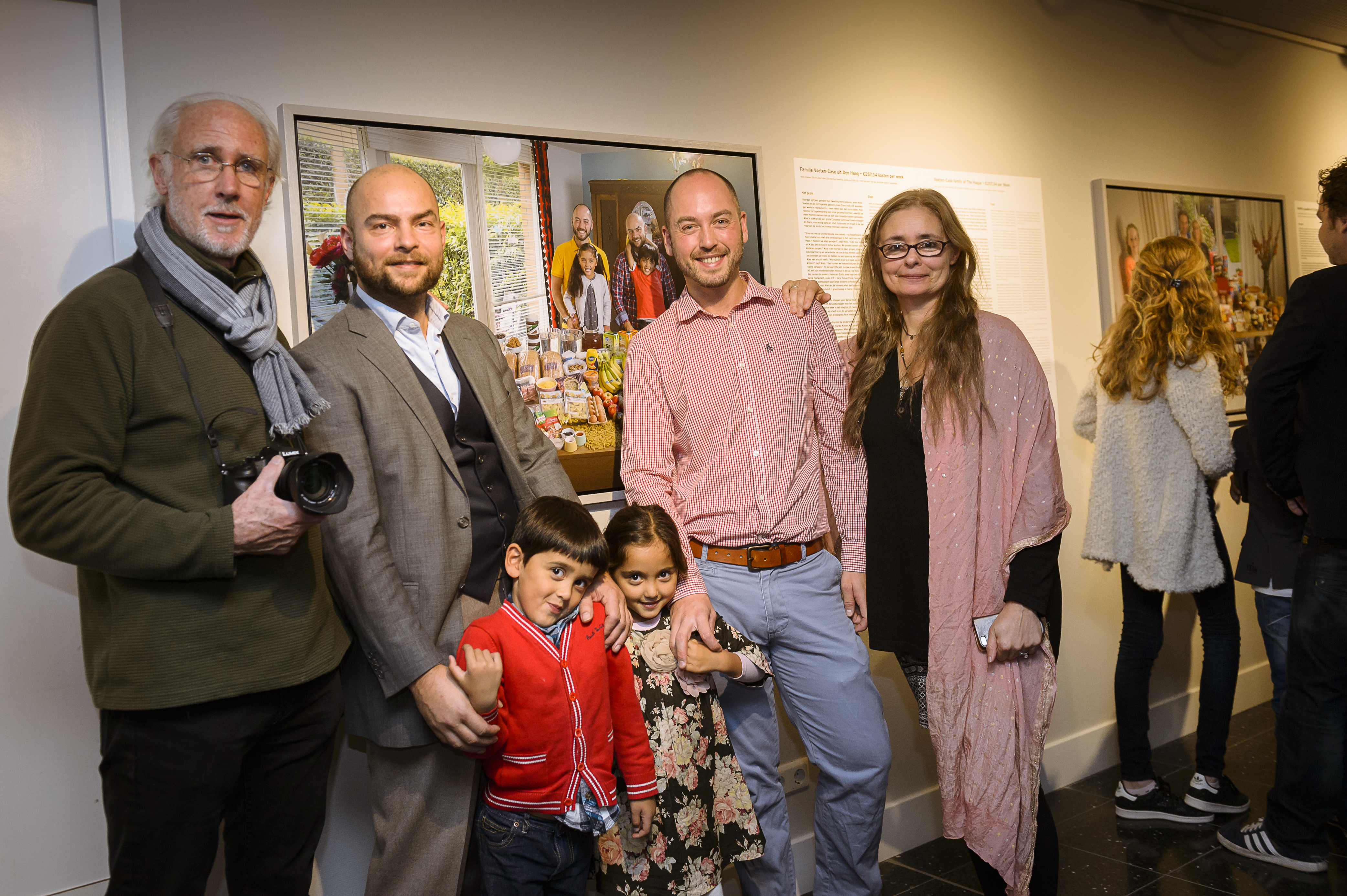 Op de gemaakte foto’s op onze site berust een copyright. Vermelding van het copyright is altijd verplicht: Bas Arps / ANPinOpdracht Familie Case - Voeten uit Den Haag poseert samen met fotograaf Peter Menzel en journalist Faith d'Aluisio voor hun foto in het Fotomuseum in Den Haag.